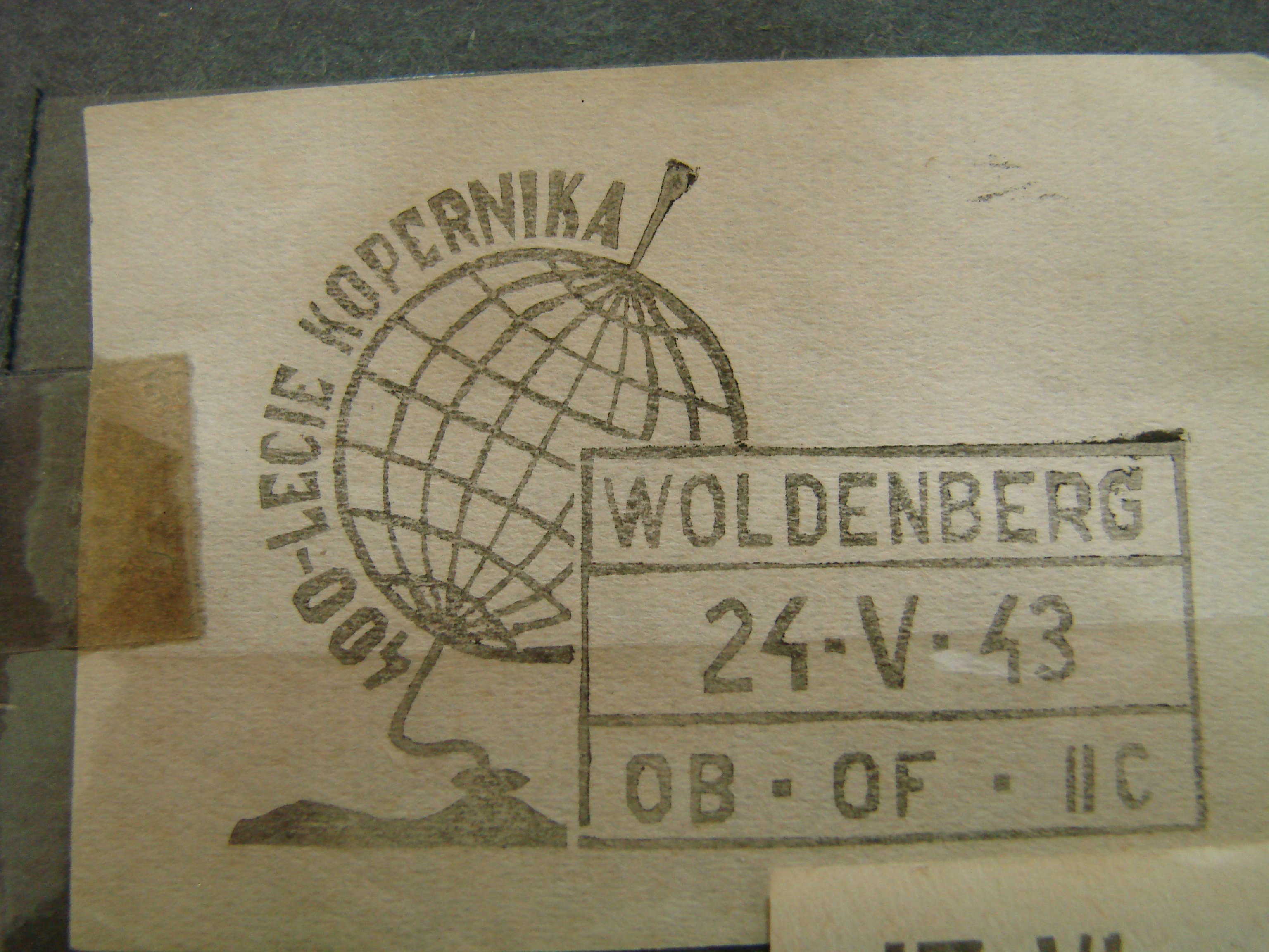 Stempel der Lagerpost des Offizierslager II C in Woldenberg.